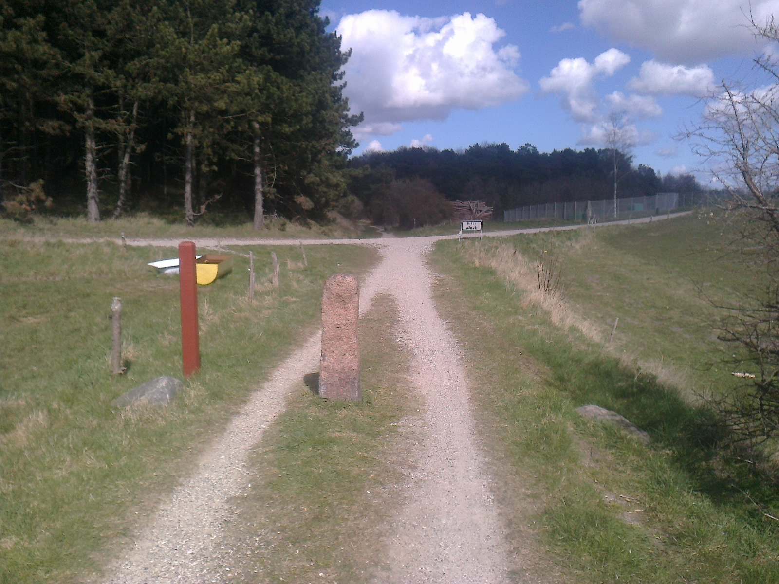 Gravlevstien ved Dråby Trinbræt